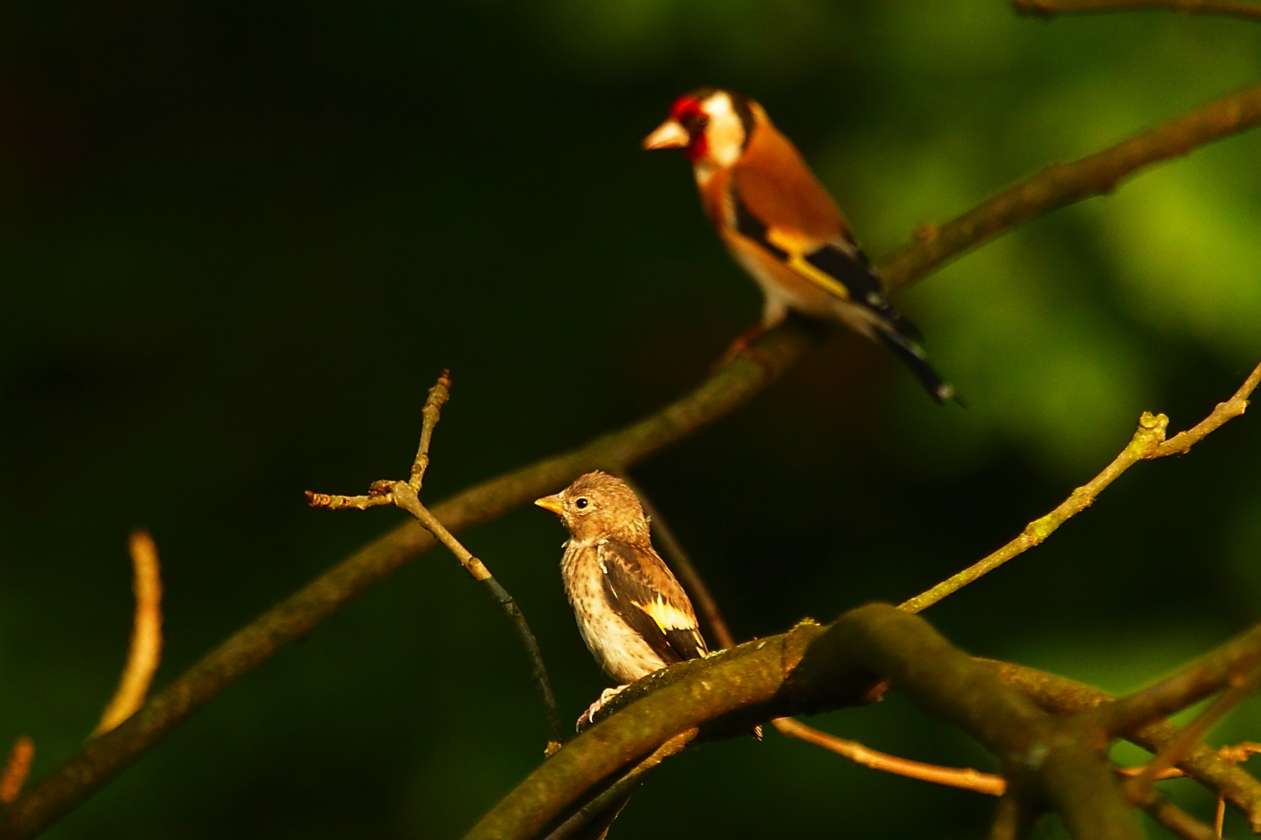 Ein Stieglitz Jungtier